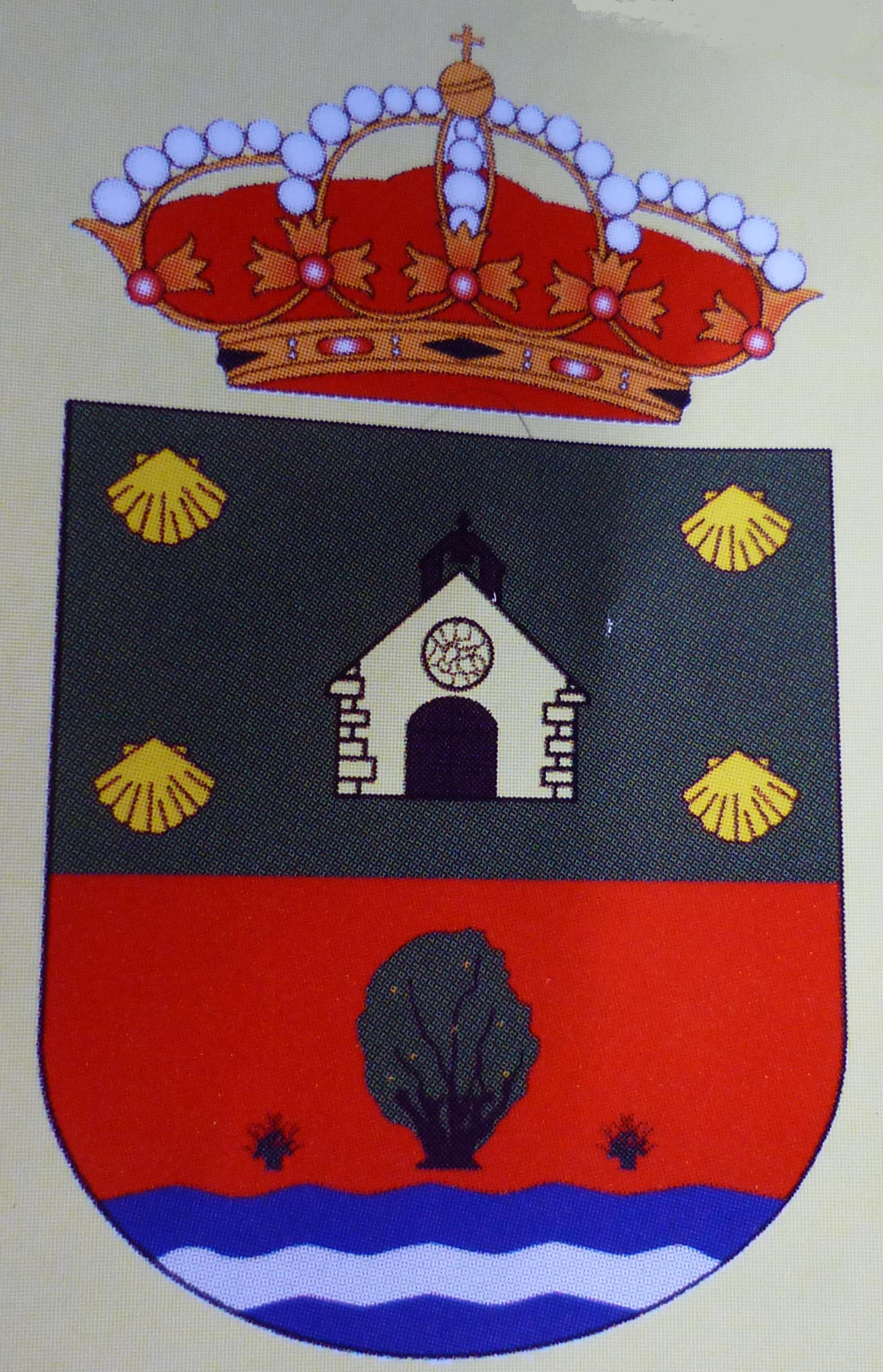 Foto escudo Santiago y Zaraiche